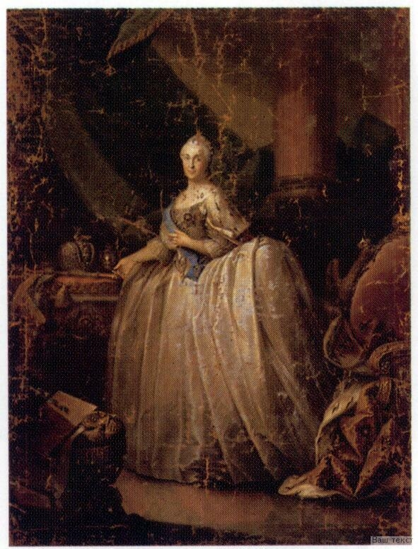 Большой парадный портрет императрицы Екатерины II/ Государственный Русский музей. Холст, масло. 285 х 213 Слева внизу подпись и дата: H. Buchholtz px. 1765. На подрамнике штамп: Г.Р.М. Ж-8069 (номер зачеркнут) Поступила: 1927 из Музея отживающего культа Общества „Старый Петербург" - „Новый Ленинград" (Ленинград); ранее - училище святого Петра (Петроград) Ж-5863 Изображена с орденом святого Андрея Первозванного (лента и звезда). Д.А. Ровинский считал, что Бухгольц копировал портрет Екатерины II с оригинала В. Эриксена (Ровинский. Портреты*, т. 4, стб 396).